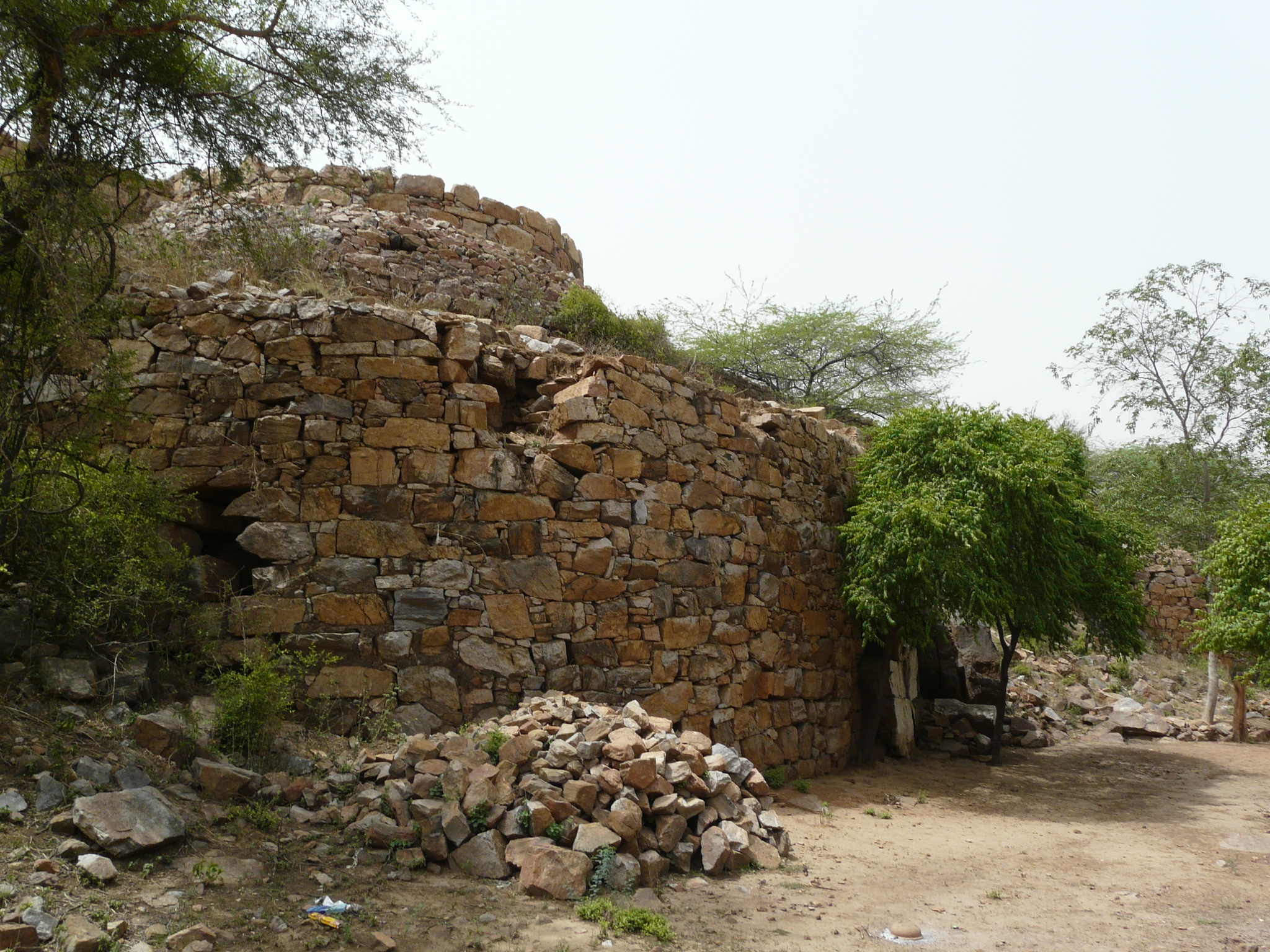 Lal Kot walls Lal Kot